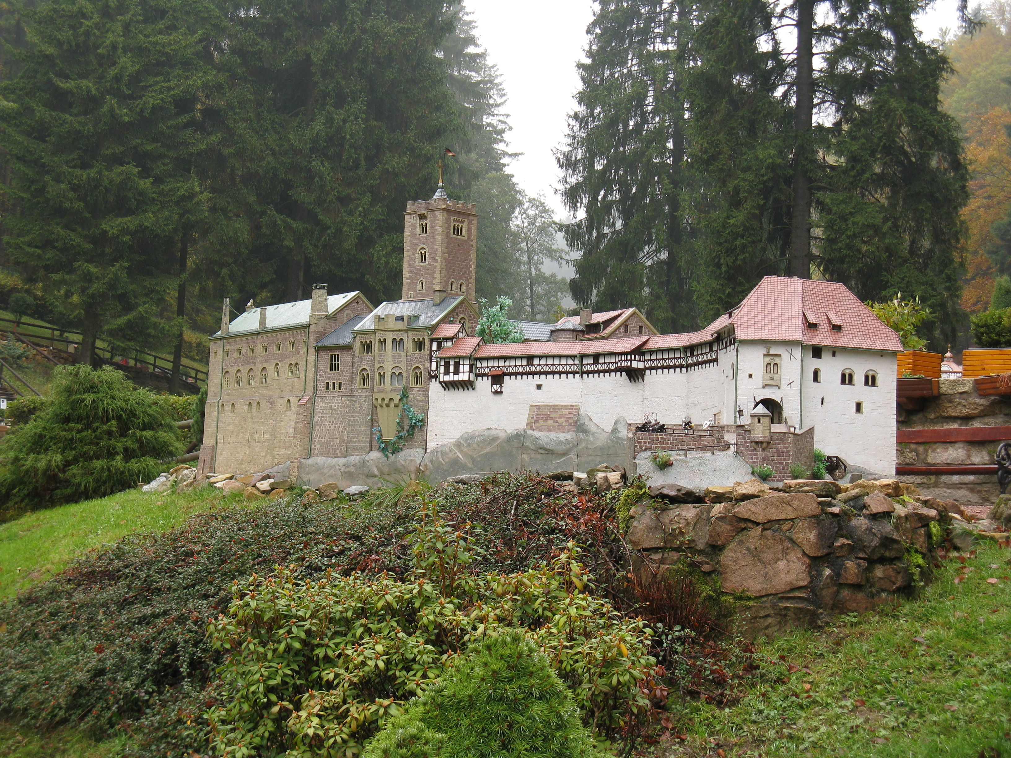 Mini-a-Thür in Ruhla: Wartburg